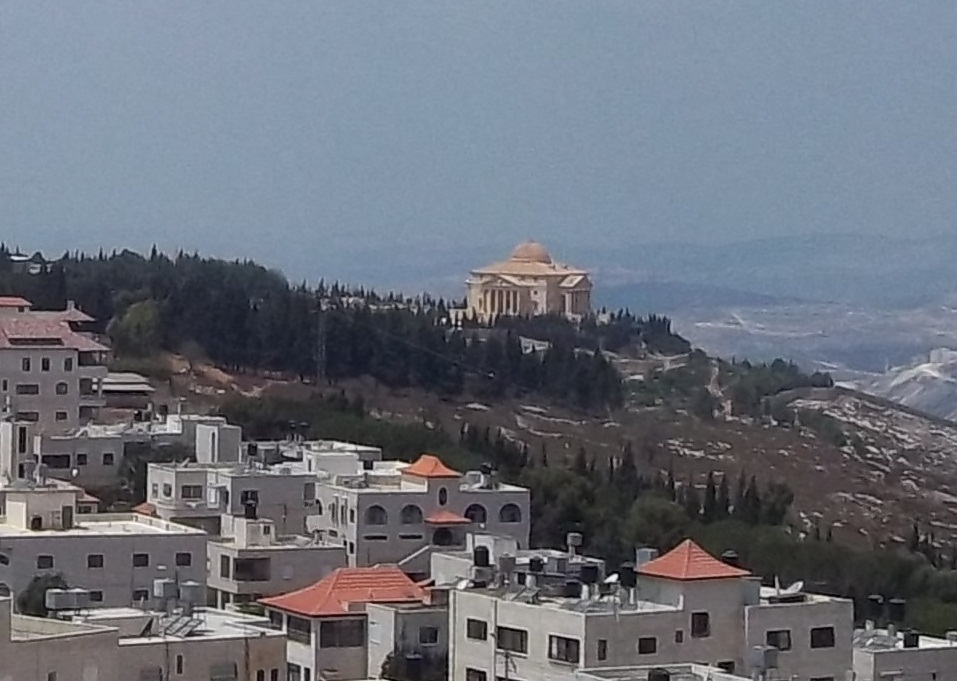 ארמונו של מוניב אל מסרי בהר גריזים